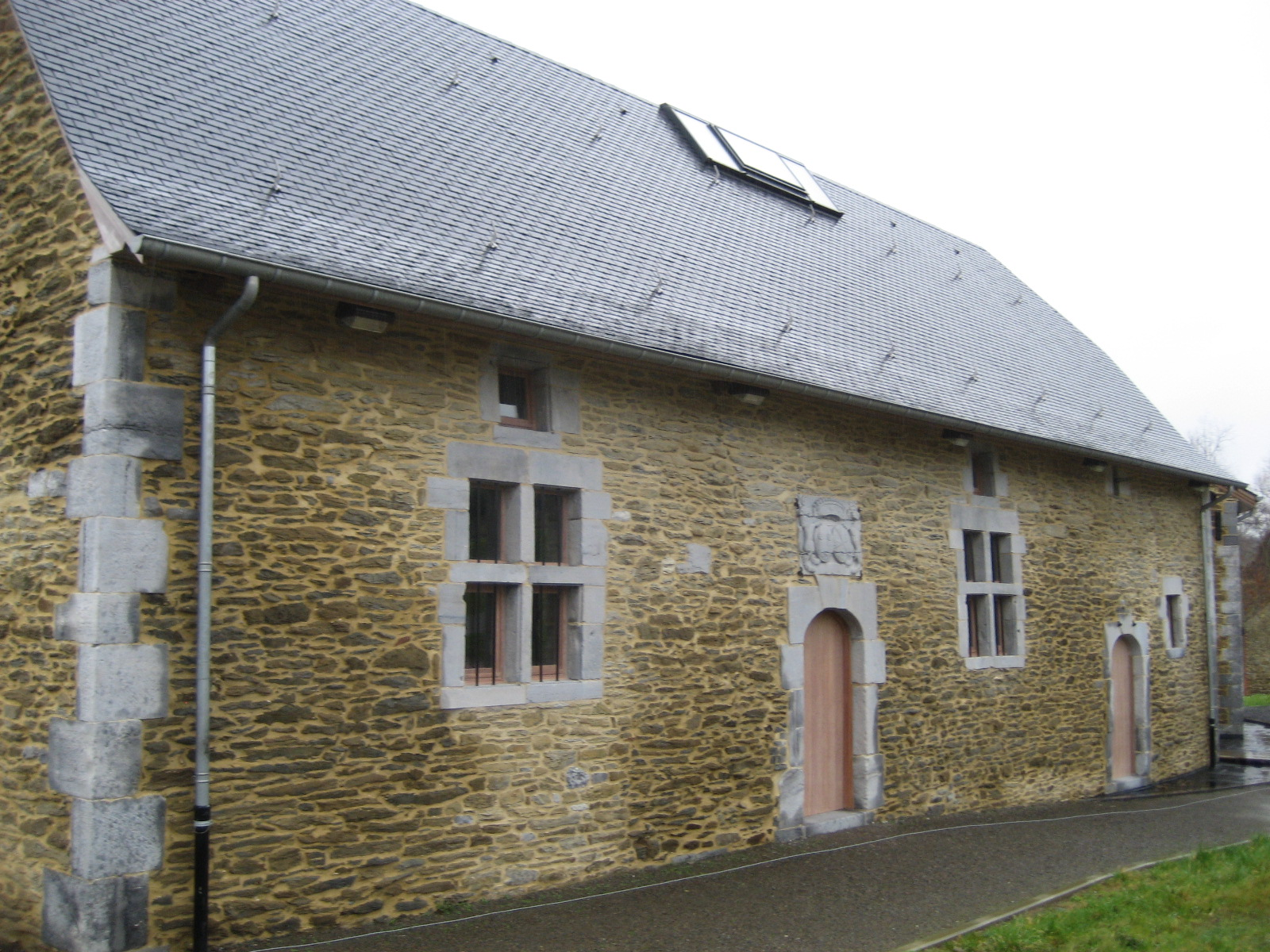 Ancienne cour de justice (façade et toitures), place de la Cour de justice, n°2